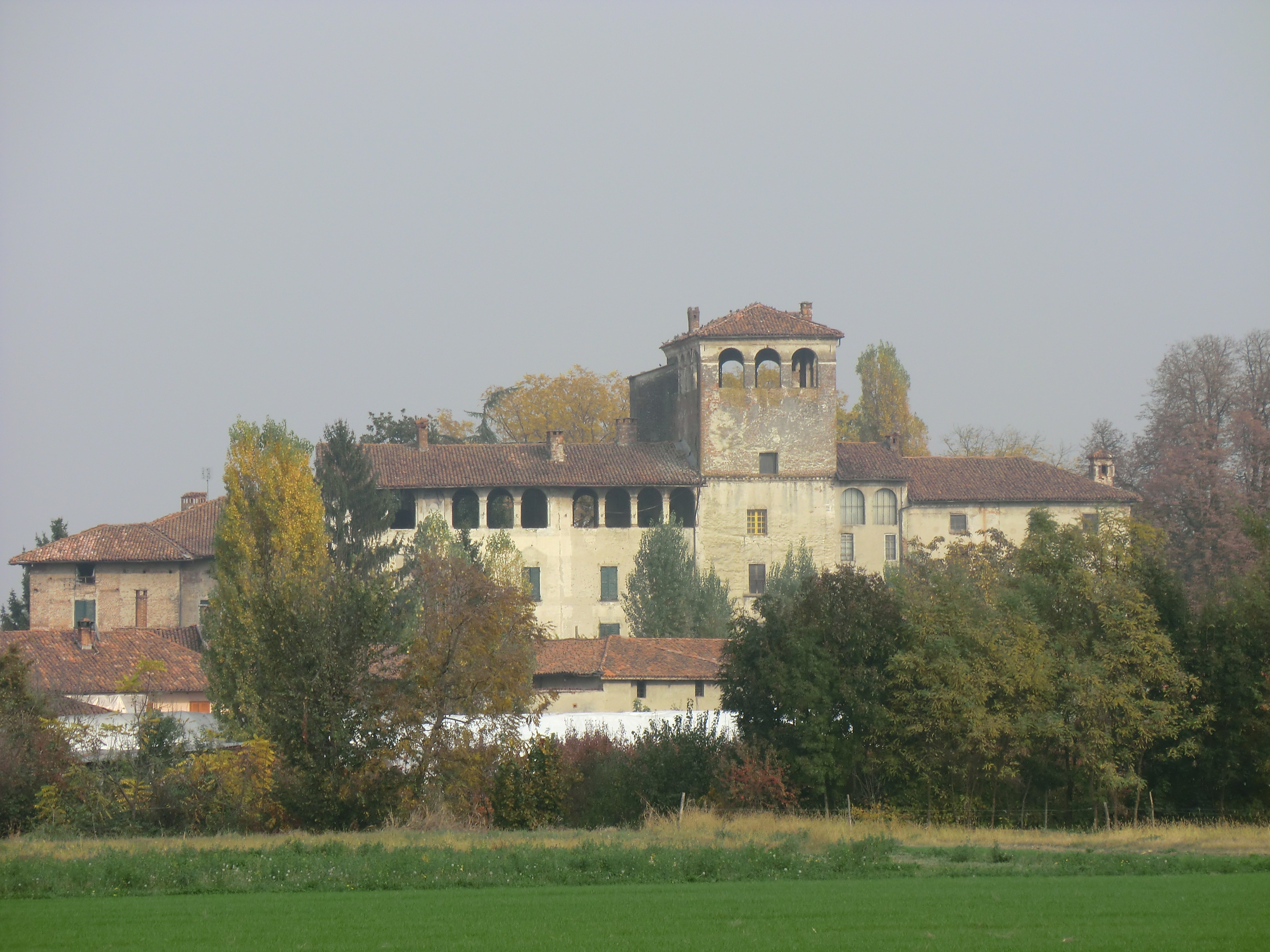 Ruffia (Cuneo - Italia): castello privato